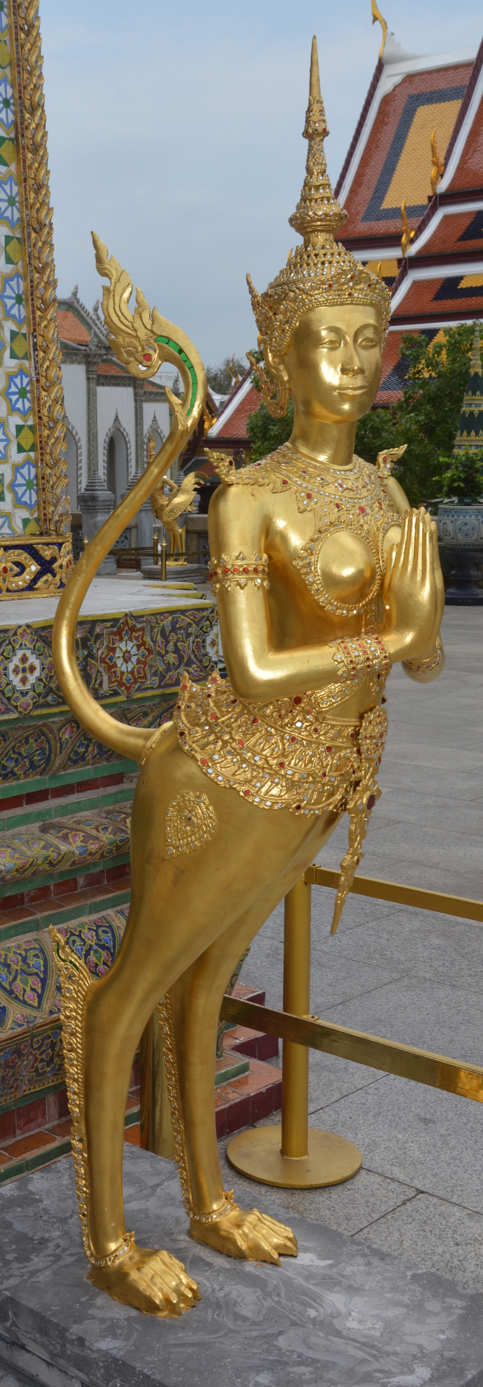 Statue d'Apsonsi dans le Wat Phra Kaew